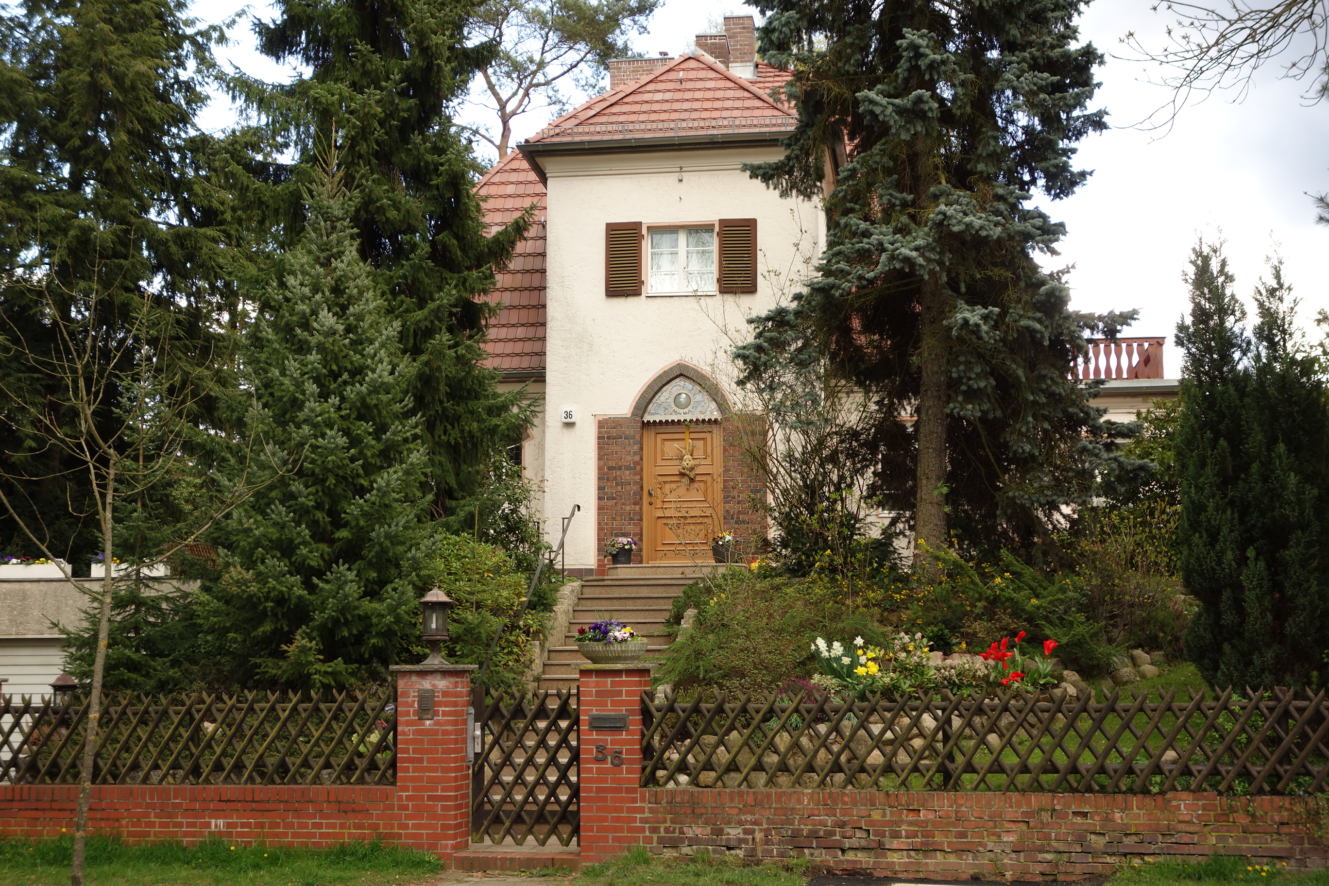 Kulturdenkmal Berlin Frohnau Alemannenstraße 36